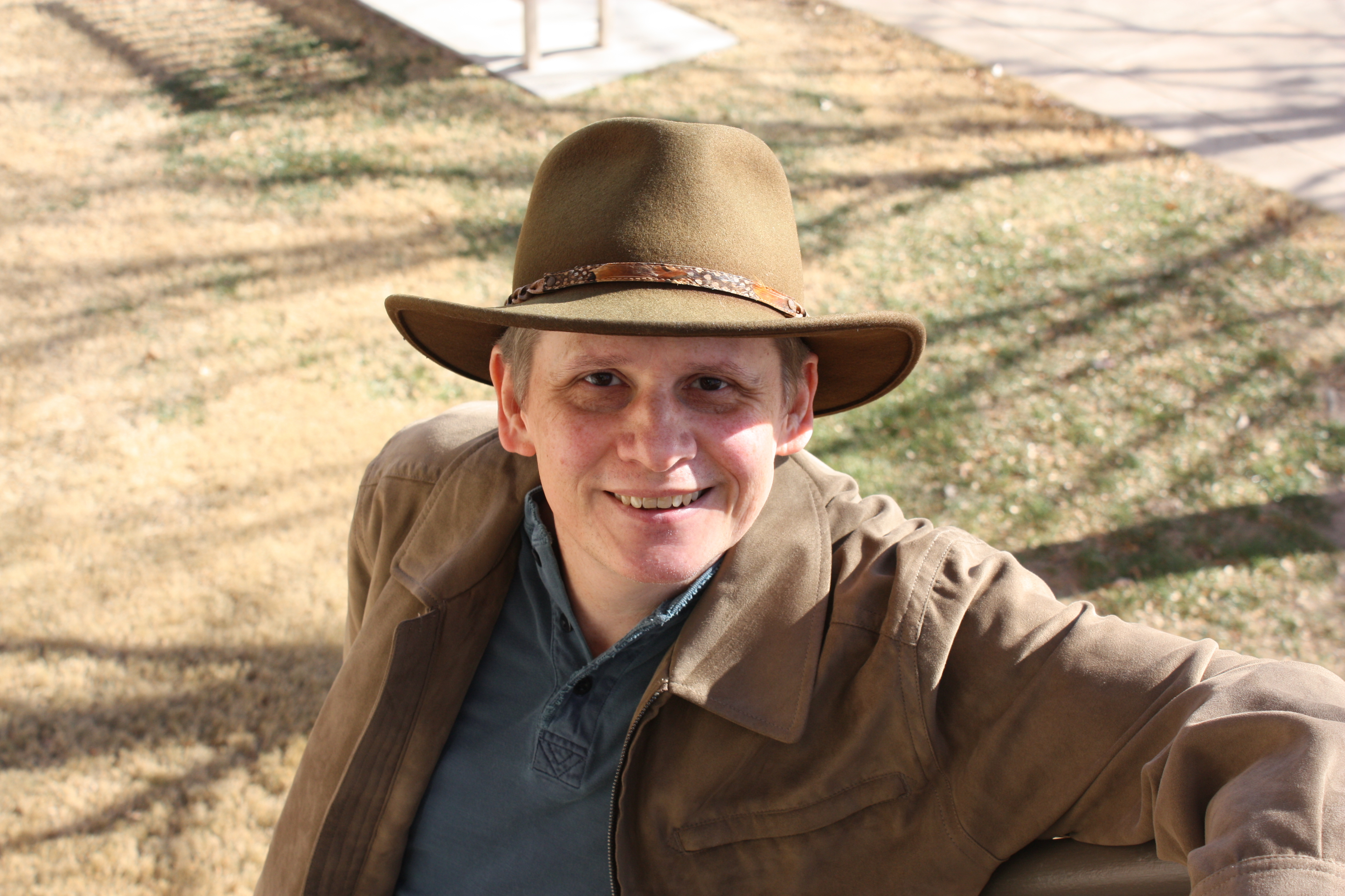 Thomas S. Ray